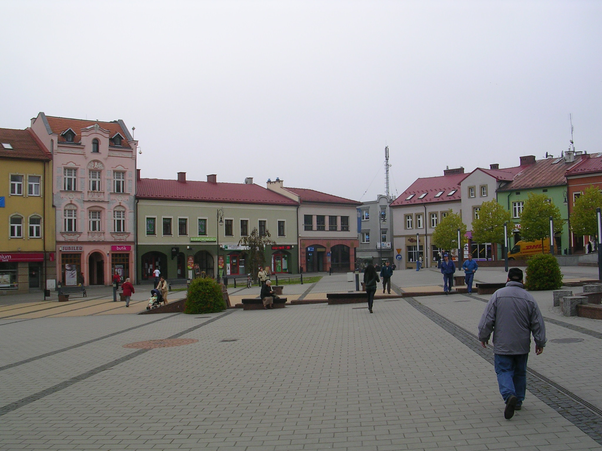 כשאנוב, כיכר-מרכזית, ריינק (צילום: הולנדר 2010)